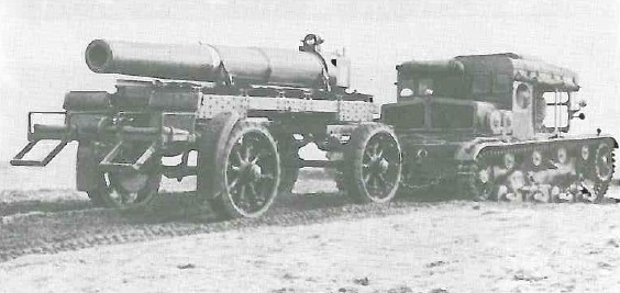 7CP i moździerz wz. 32